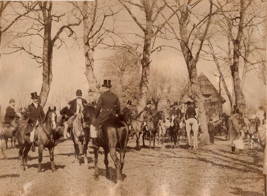 Membres du Pau-Hunt à cheval au rendez-vous de chasse (Arsenius; Arthur Smyth, baron d'Este; Hubert, comte de Ganay; James Mellor; Prince de Poix; William Knapp Thorn, Edgard Lejeune, G. Brinquant)